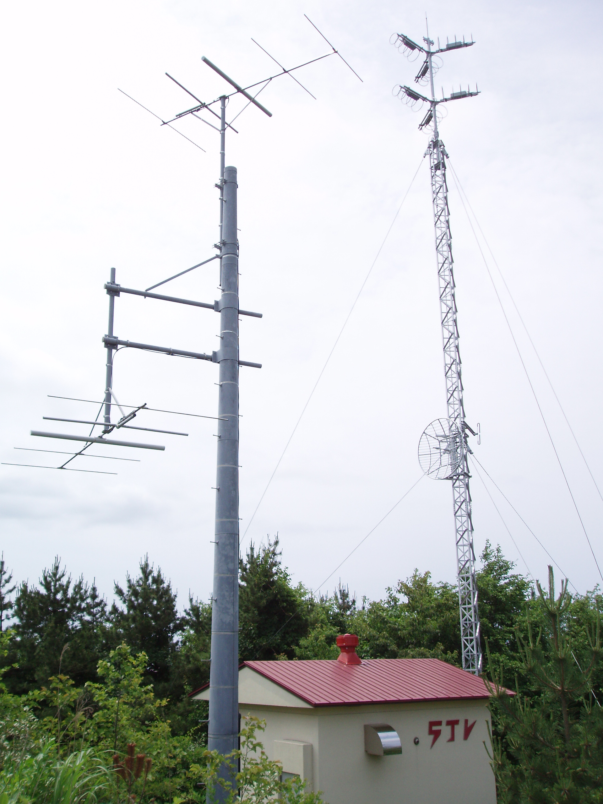 江差中継局 STV送信設備